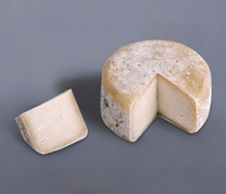 Queso Valle del Narcea